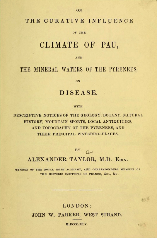 Traité du Docteur Alexander Taylor relatif à l'influence curative du climat de Pau et des eaux minérales des Pyrénées sur les maladies